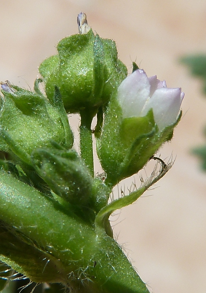 Malva parviflora (Malva, malva de flor chica): Inflorescencia axilar - Descampado c./San Antonio con Compositor Manuel Berná García, Albatera (Alicante, España).